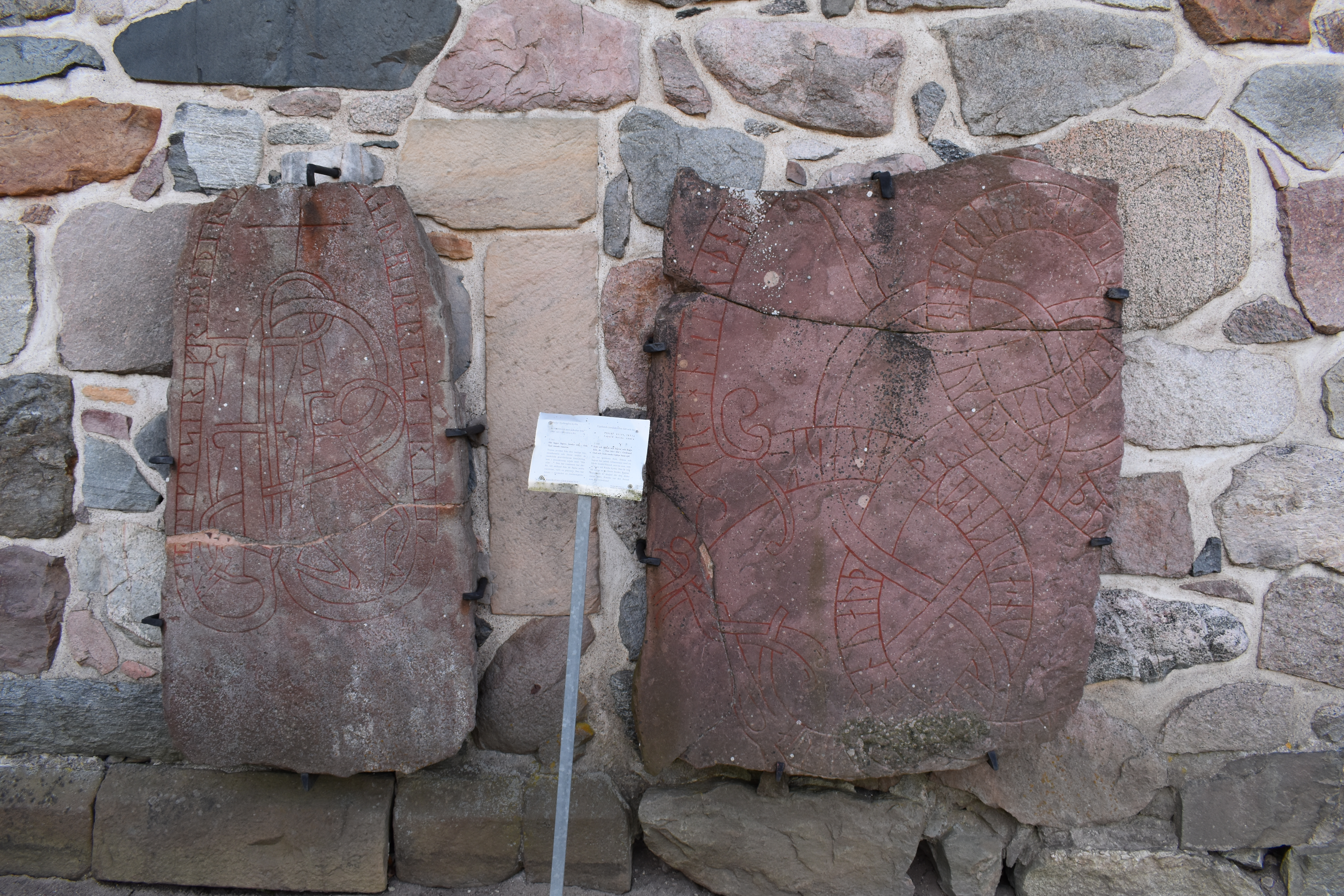 Upplands runinskrifter 541, Husby-Sjuhundra 20:2. Fotograferad 2017. Enligt Upplands runinskrifter lyder inskriften:"Här ligger Sigrev, broder till .. och Öpir ristade runorna."